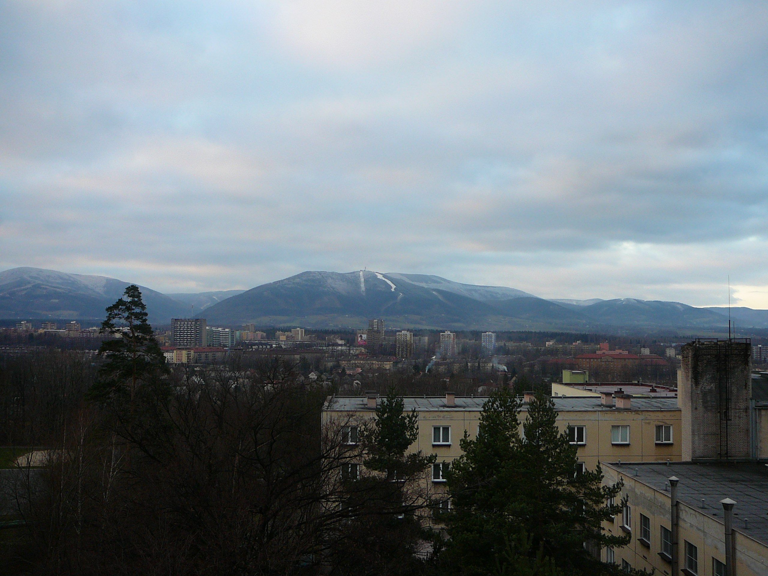 Pohled na Třinec ze sídliště Sosna